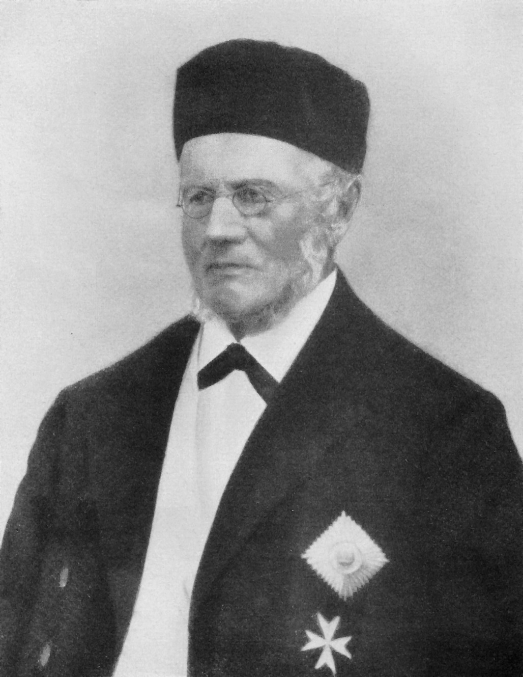 Gustav von Saltzwedell